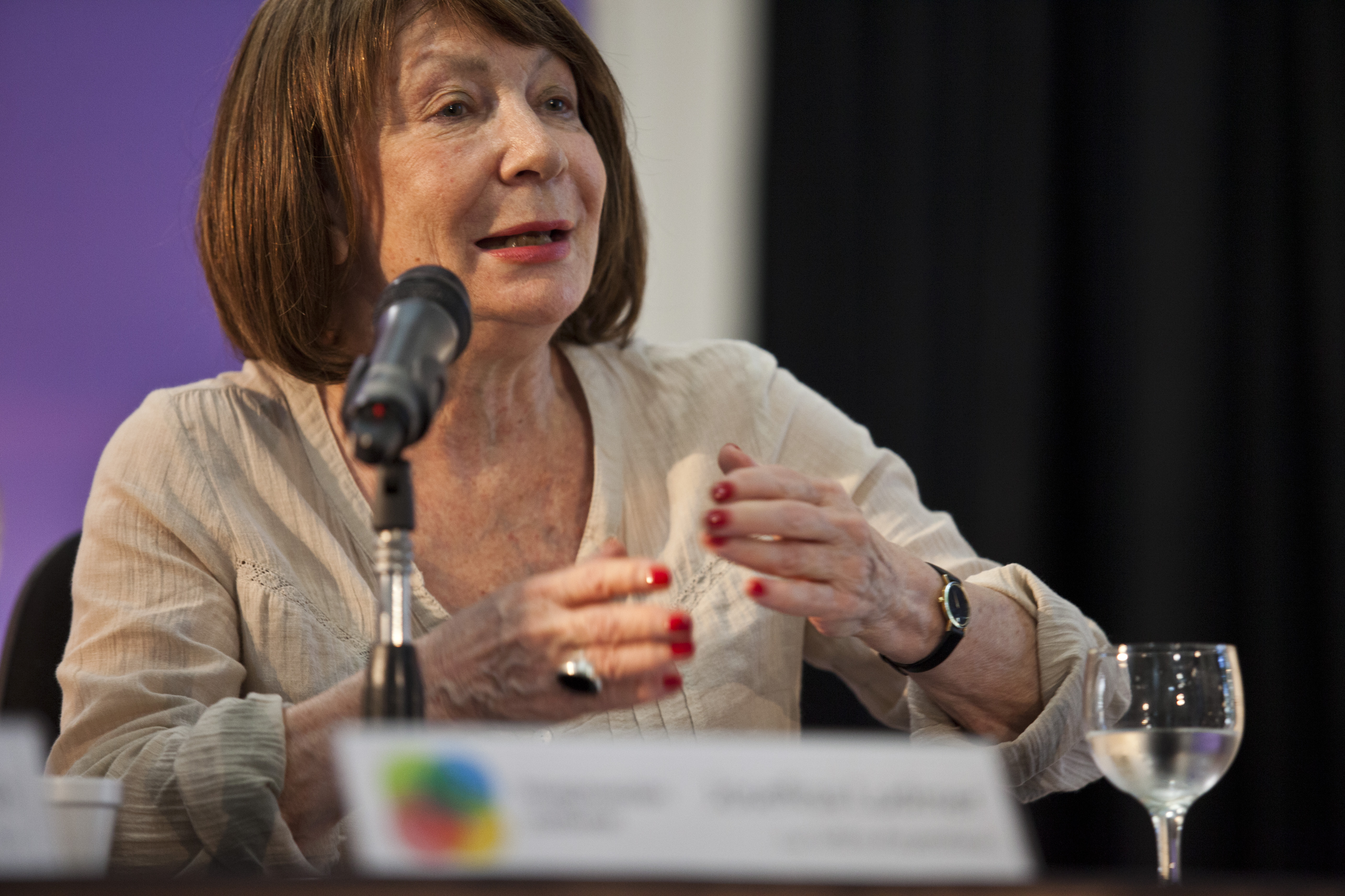 Buenos Aires, 7 de noviembre de 2014 - Se desarrolló en el Centro Cultural "Paco Urondo" la segunda jornada del encuentro de escritores "La letra argentina. Lenguajes, política y vida en el siglo XXI", organizado por el Ministerio de Cultura de la Nación y la Facultad de Filosofía y Letras de la Universidad de Buenos Aires (UBA). Con formato de diálogo disertaron Josefina Ludmer y Florencia Garramuño.